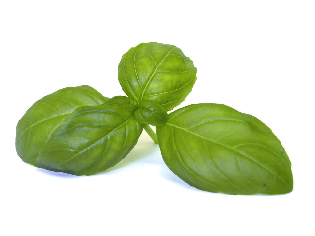 Grüne Basilikumblätter vor weißem Hintergrund. Basilikum ist eine beliebte Gewürzpflanze der italienischen Küche.